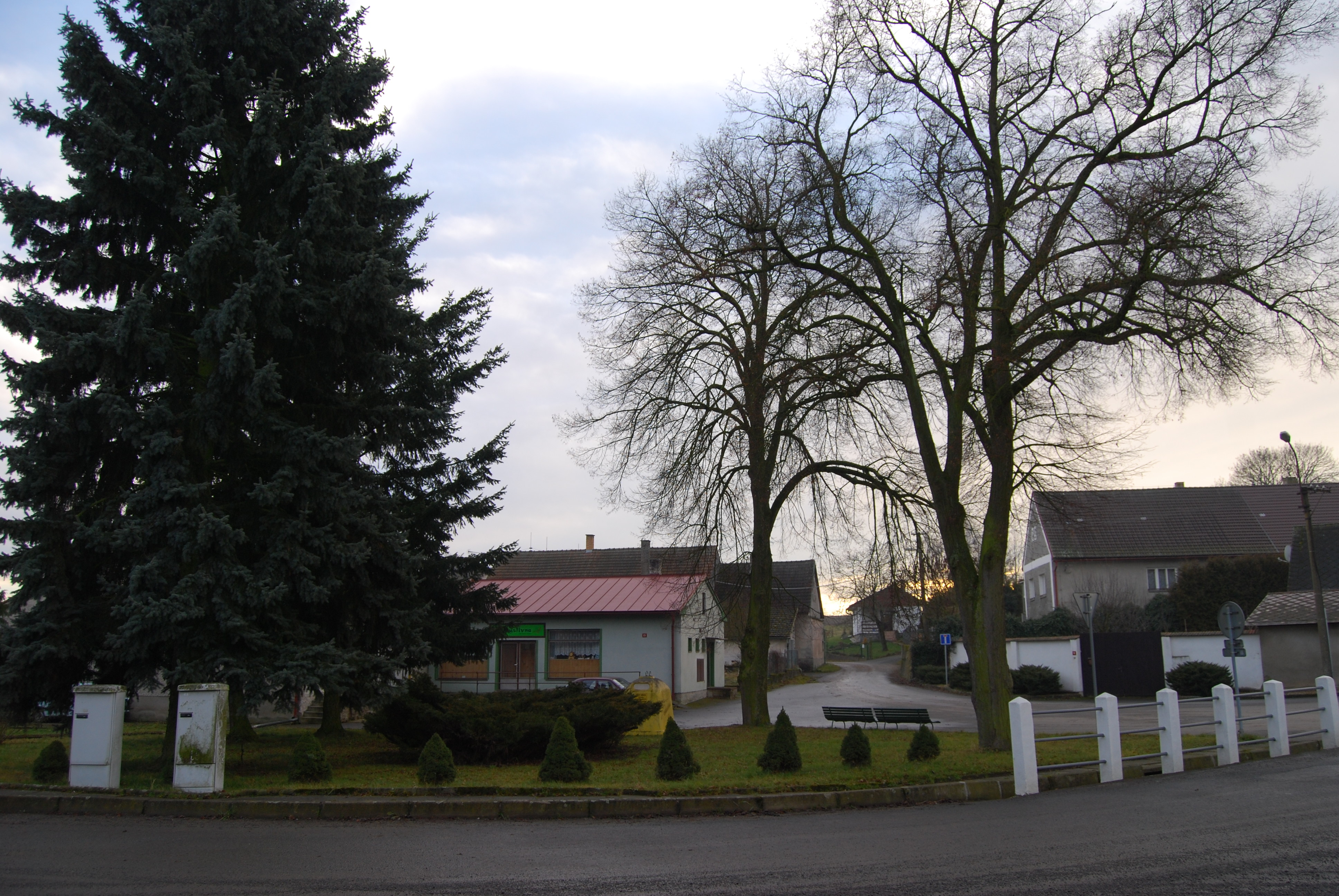 Pohled na náves. Makov je část obce Jistebnice v okrese Tábor. Česká republika.